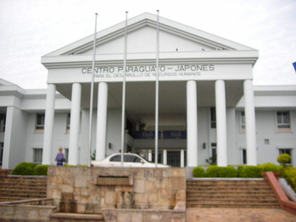 Japon